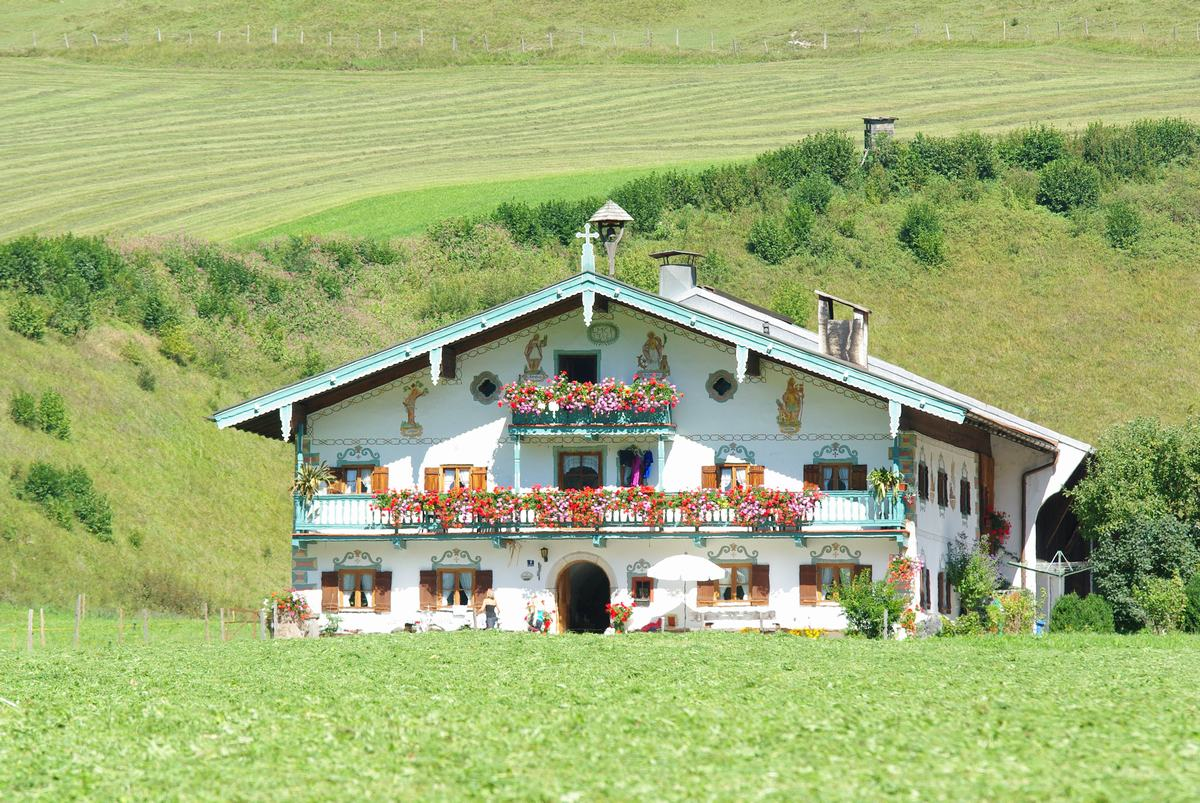 Gruberweg 9, 83458 SchneizlreuthThis is a photograph of an architectural monument.